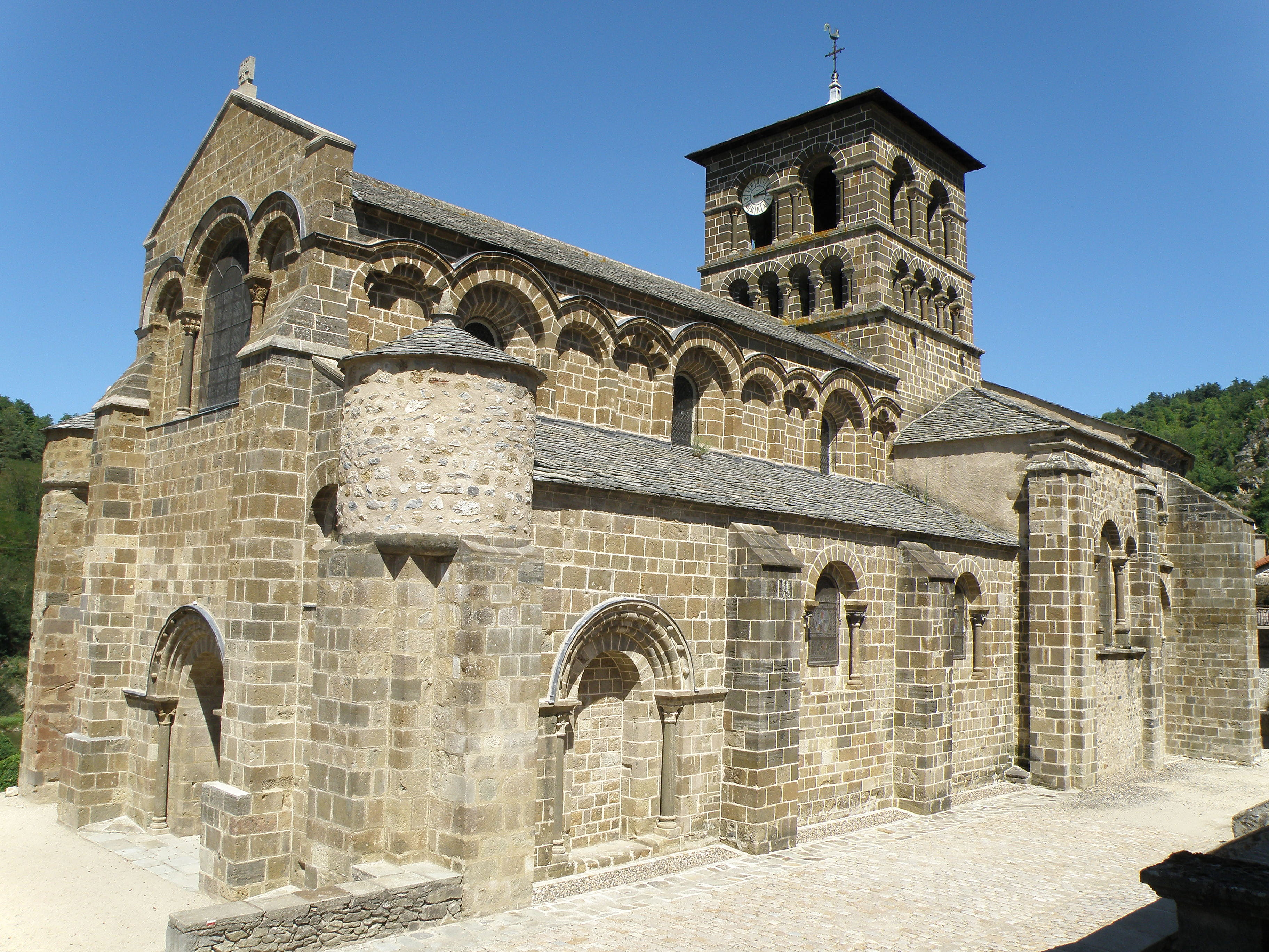 Chamalières-sur-Loire, dép. Haute-Loire, France (Auvergne). Église prieurale romane Saint-Gilles, XIe et XIIe siècles.